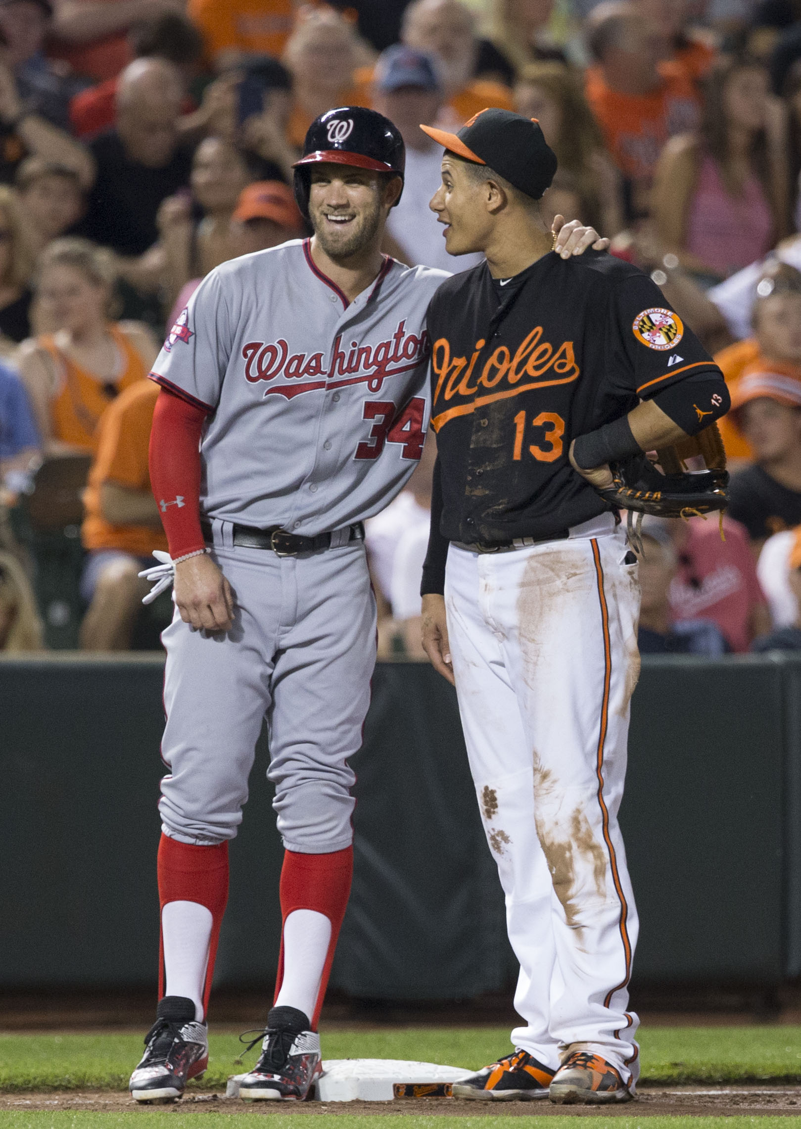 Bryce Harper (left) and Manny Machado